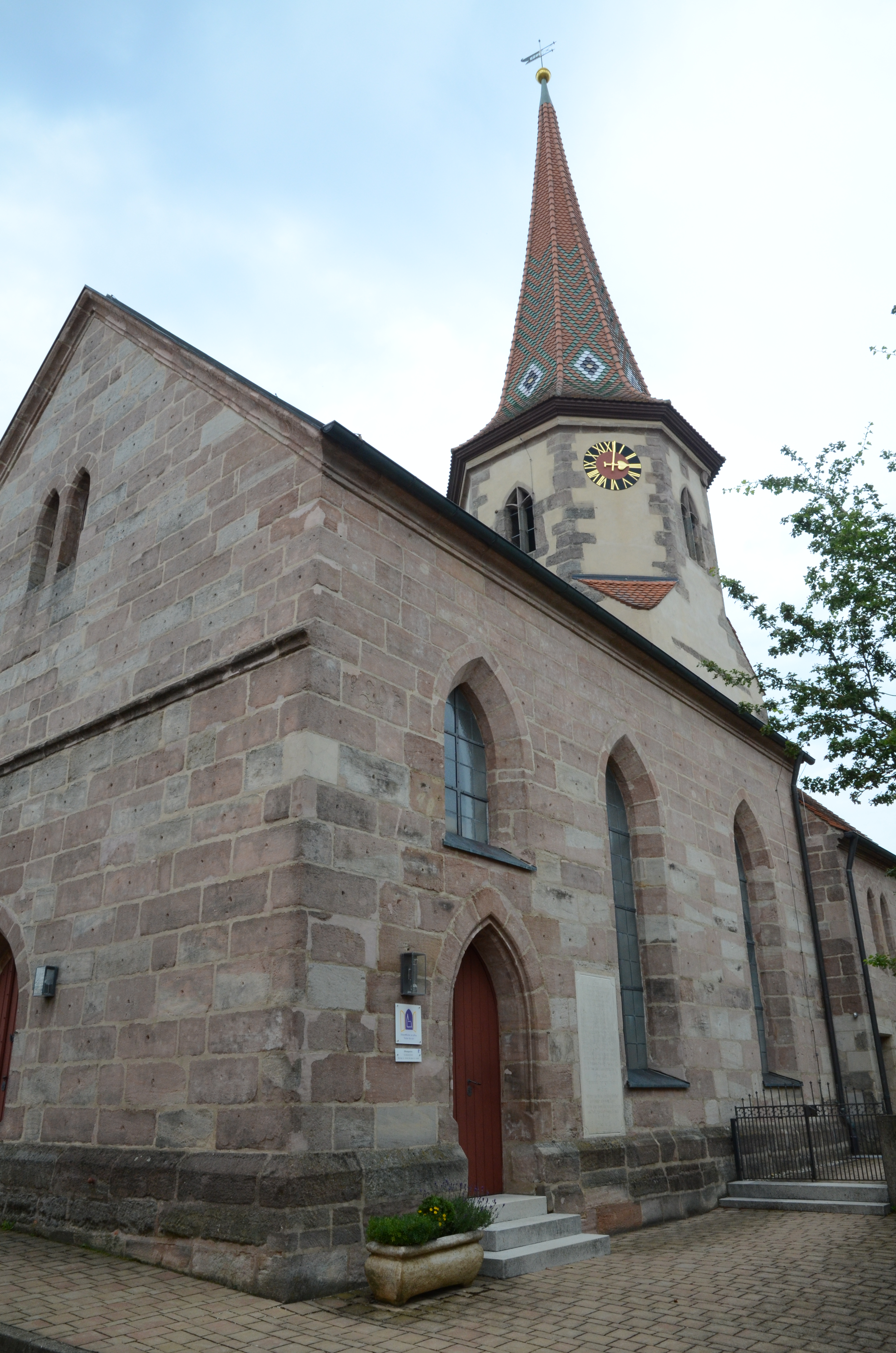 evang.-luth. Kirche St. Johannes d. T. in Dambach